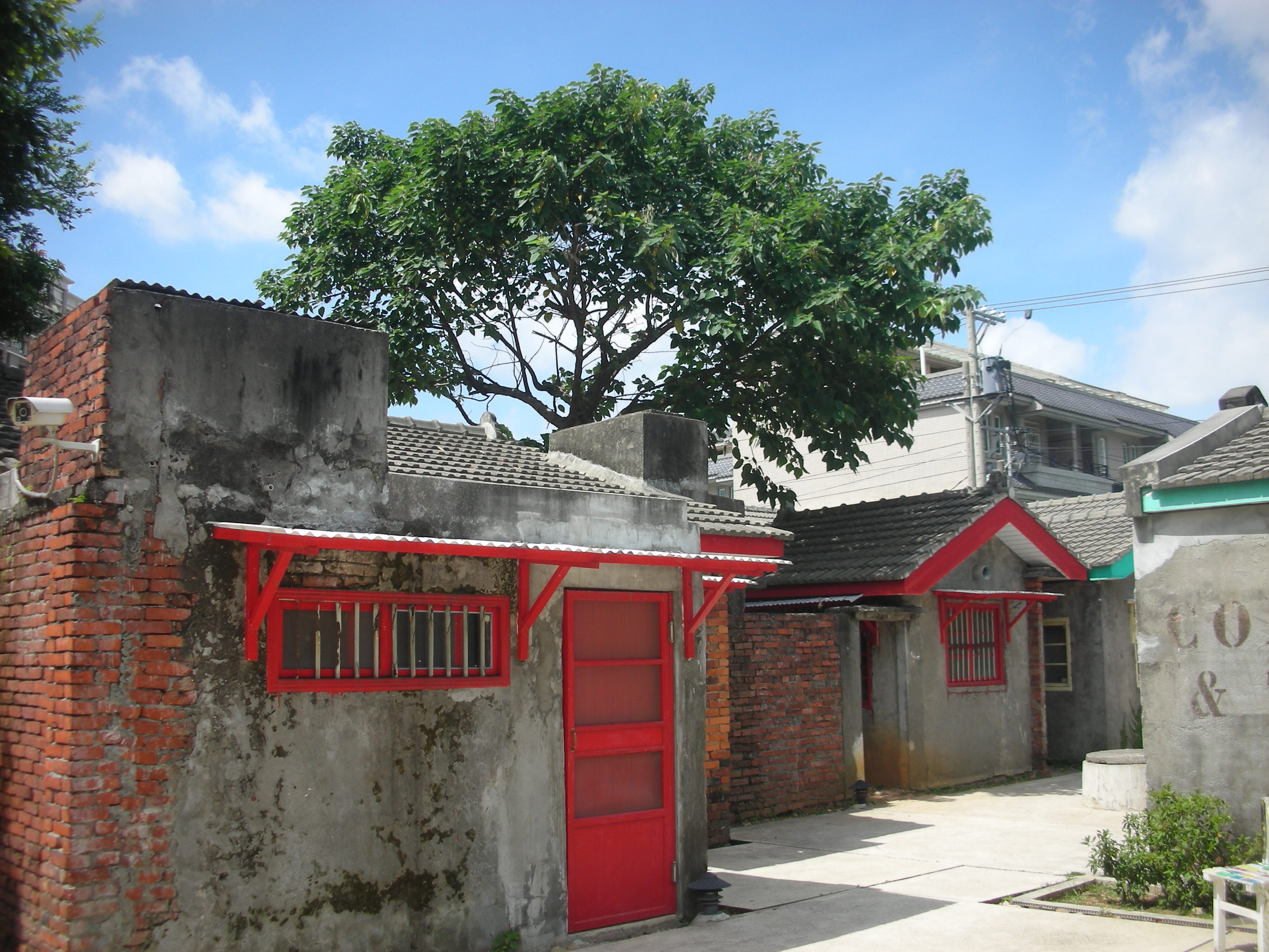 馬祖新村眷舍。